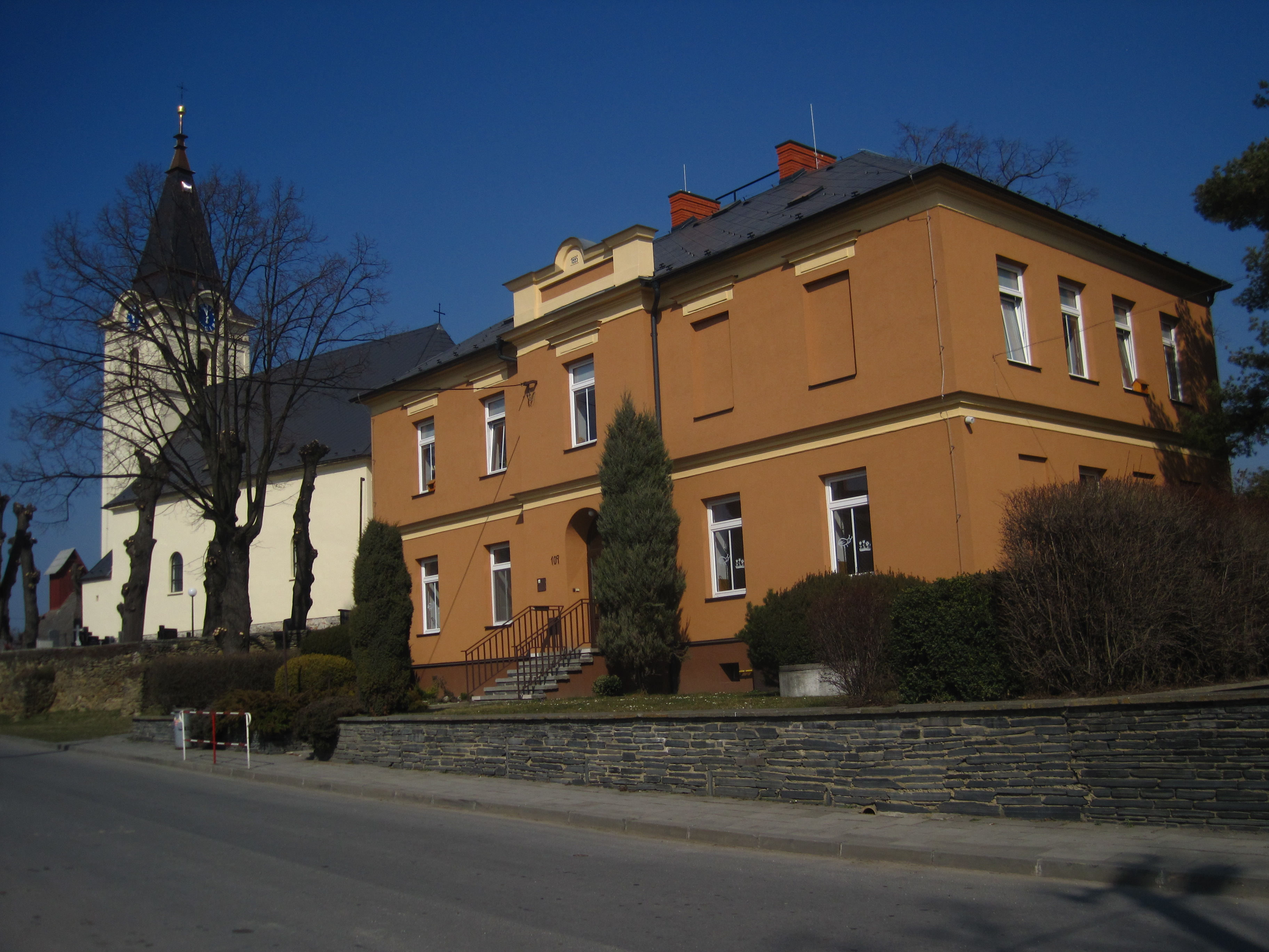 Kostel Nejsvětější Trojice, Hlavnice a základní škola.